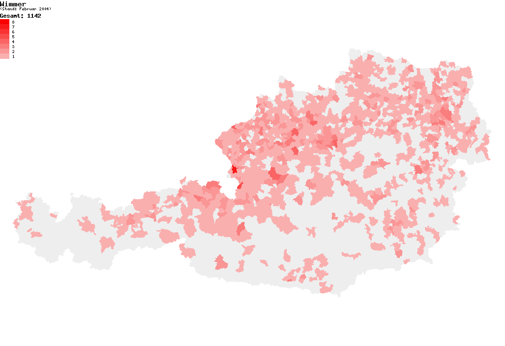 Verteilung des Nachnamens Wimmer in Österreich nach dem Telefonbuch mit Stand vom Februar 2004